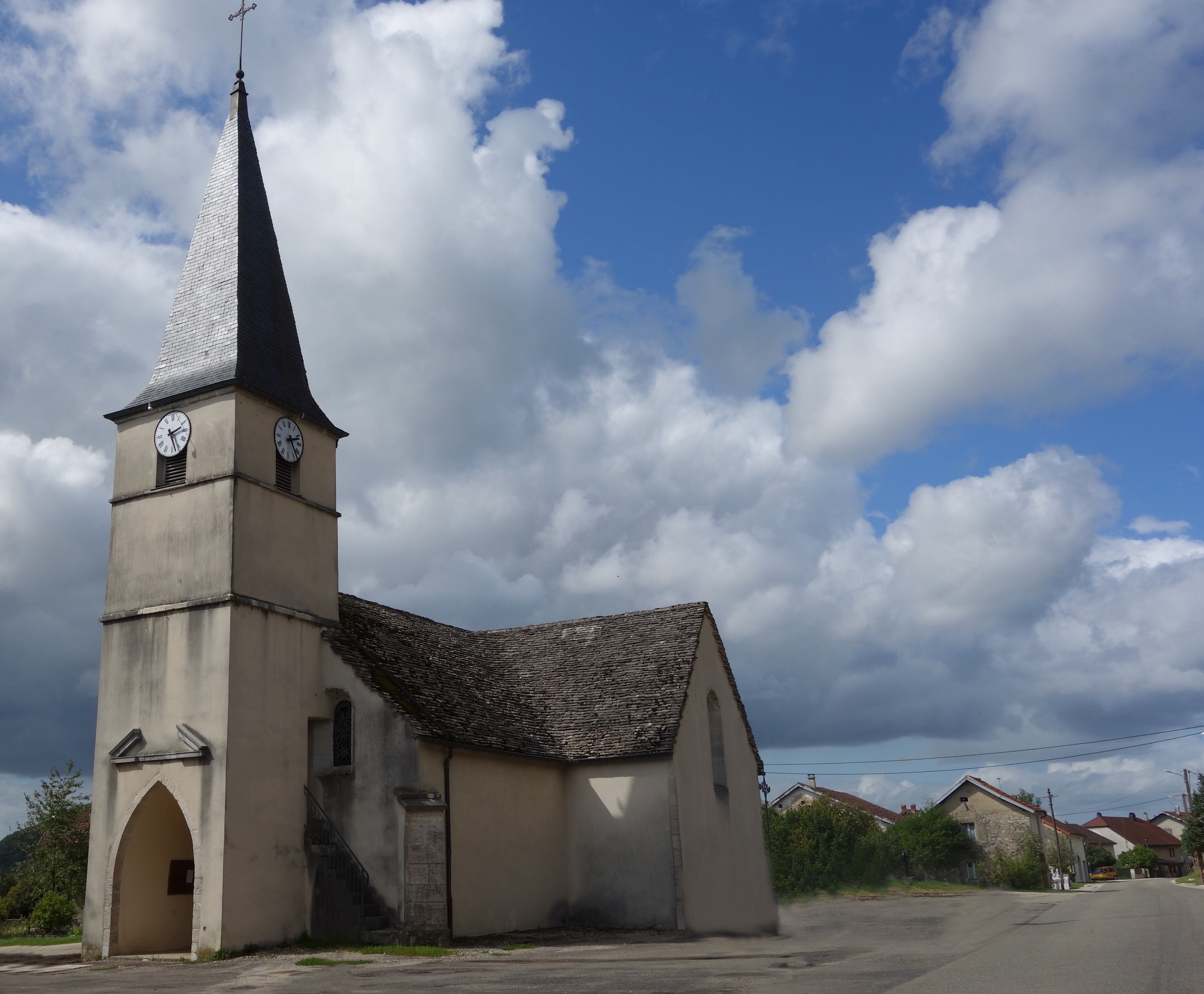 Charcier (Jura) - église Saint-Saturnin (XVIIIe s)